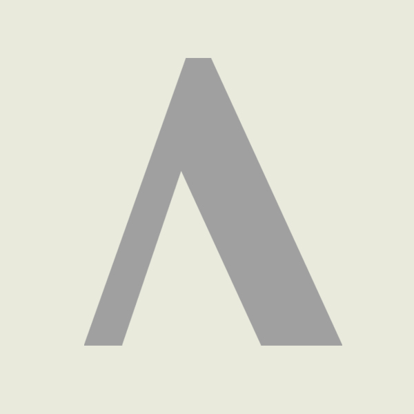 Logo del compositor Alvin Risk